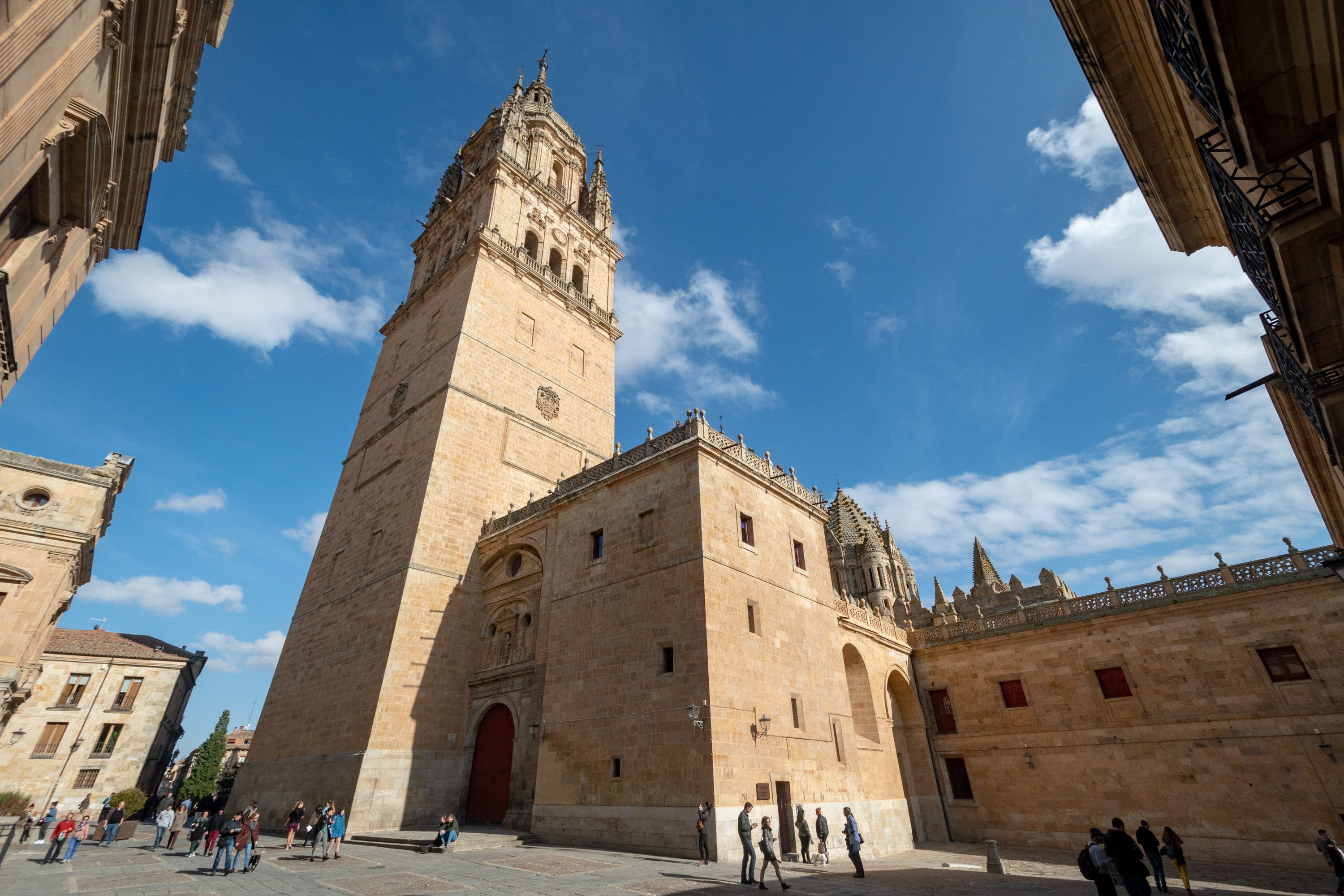 68337-Salamanca